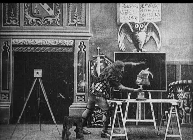 Méliès, Le chevalier mystere (Star Film 226-227, 1899)